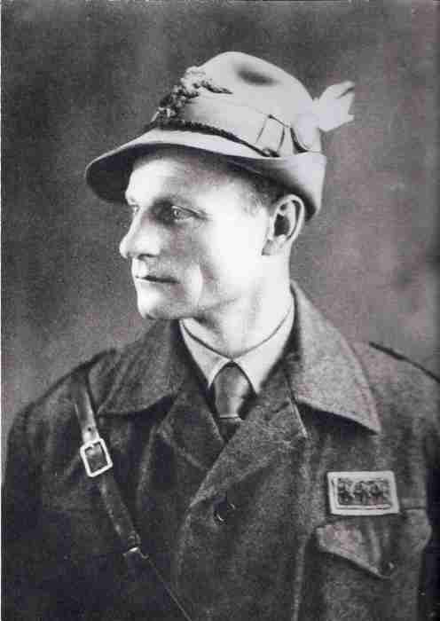 Nicola Grosa